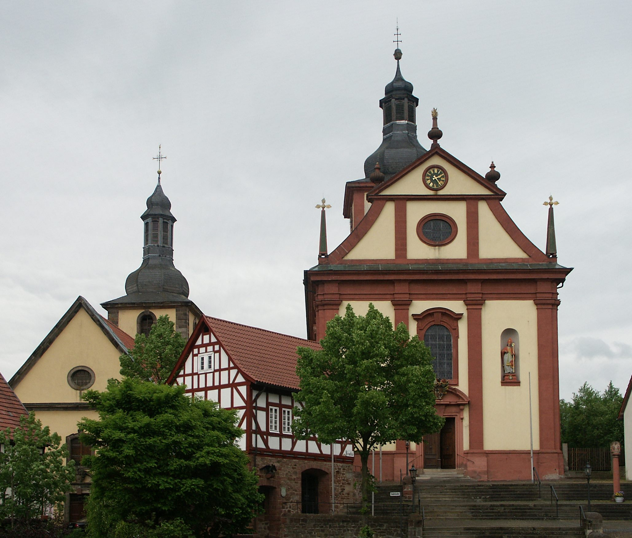 evangelische und katholische Pfarrkirche in Burghaun (Barock)